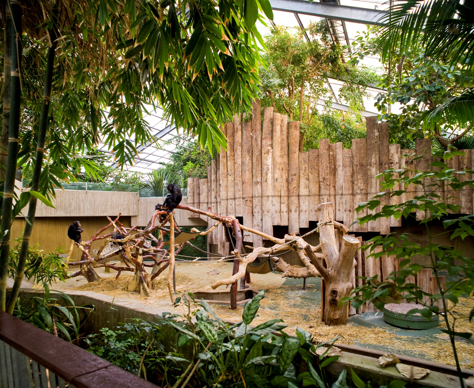 Das Gehege der Common Chimpanzee im Krefelder Affentropenhaus